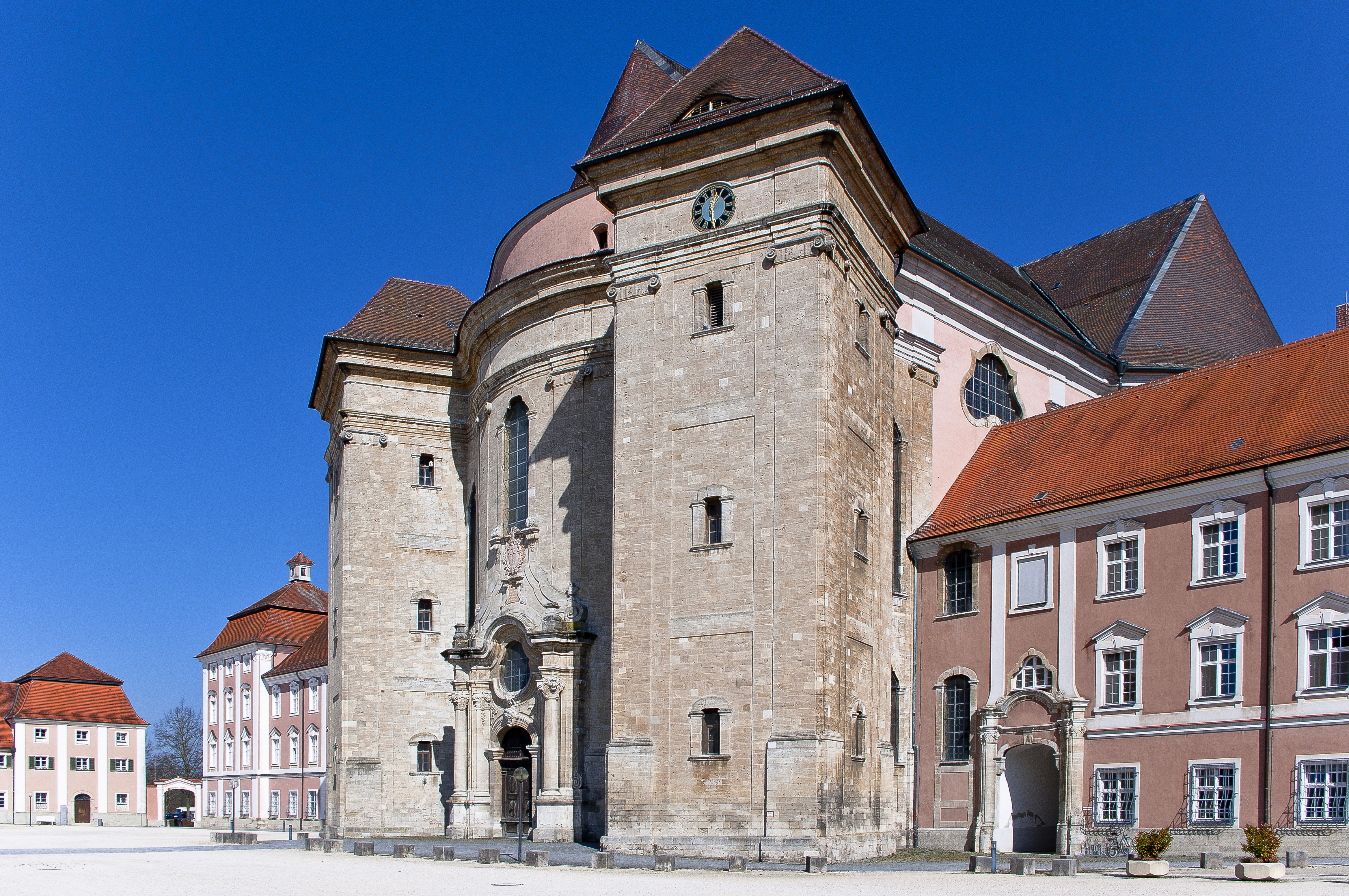 Neubau aus dem 18. Jahrhundert.